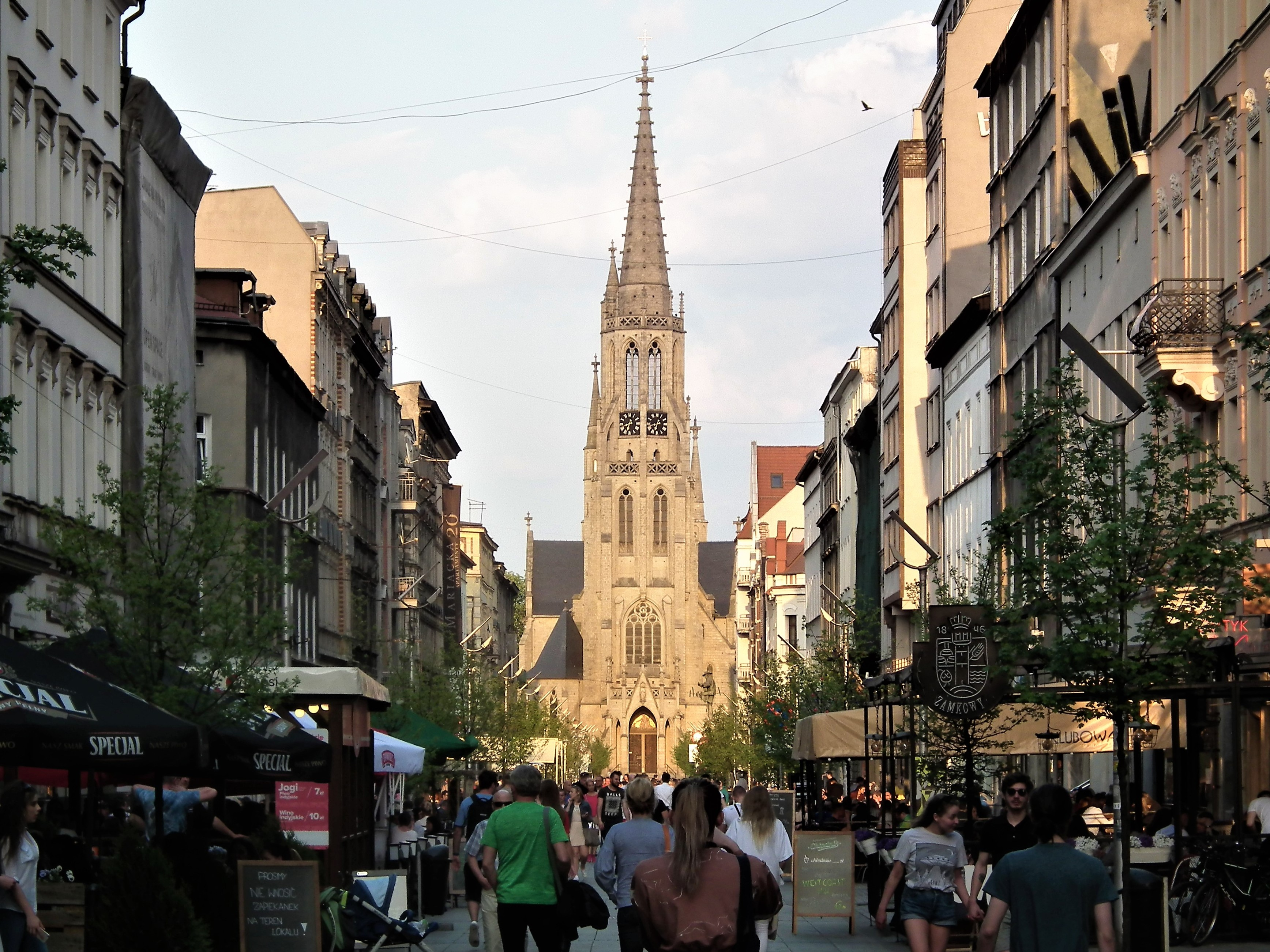 Weekendowy szum na Mariackiej w Katowicach.